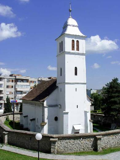 Biserica Reformata din Câmpia Turzii